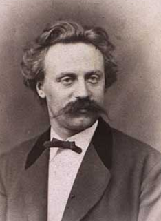 Den danske komponist og dirigent Carl Christian Lumbye (1841-1910) - søn af H.C. Lumbye Danish composer and conductor and son of H.C. Lumbye